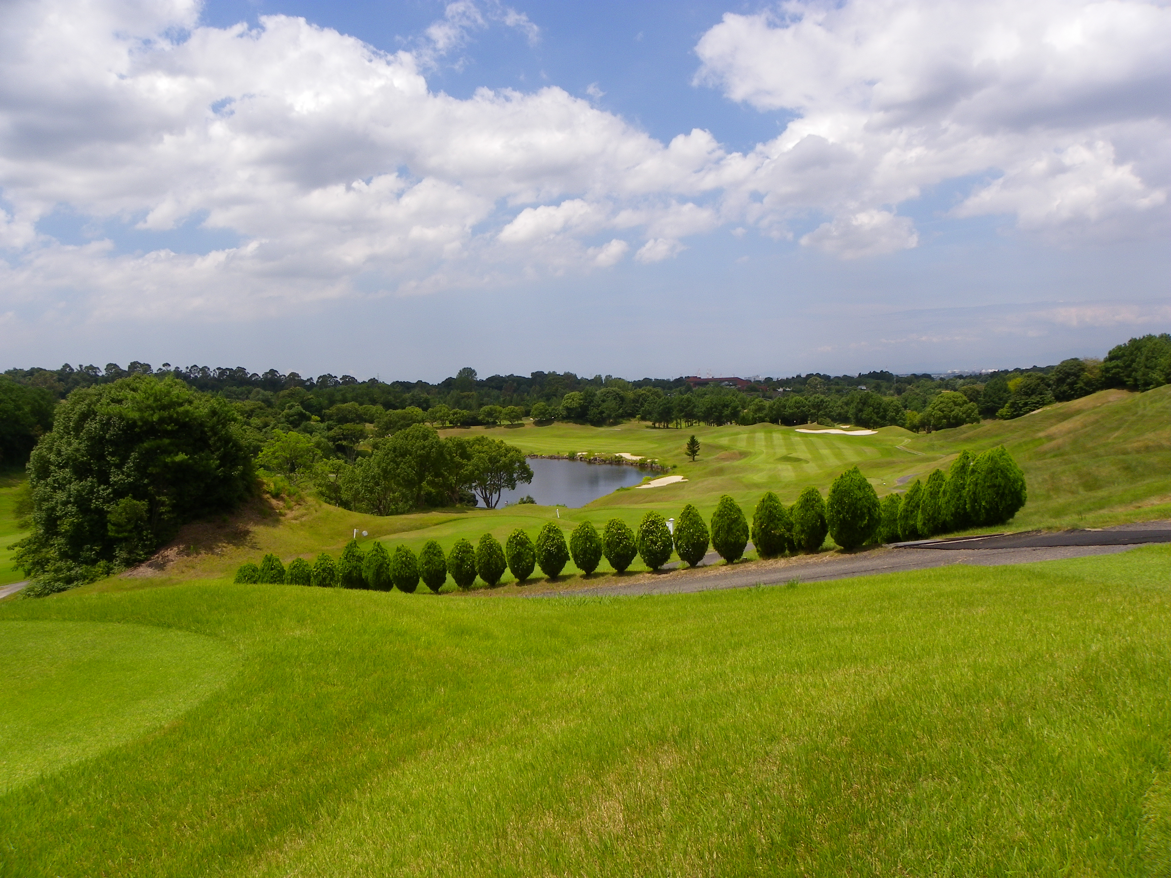 岩湧コース6番、441yard、Par4